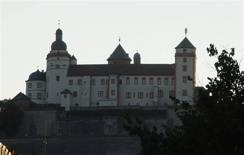 Foto:José Gonçalves